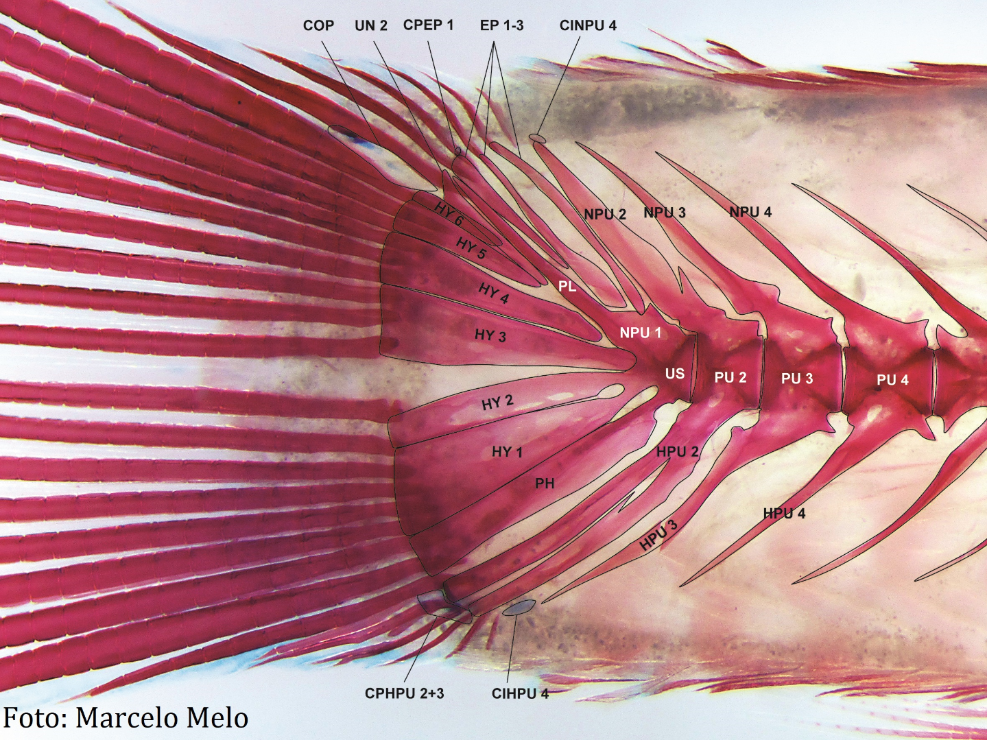 Nadadeira homocerca de Characidium travassosi diafanizada EP, epurals (epurais); HPU, haemal spine of pleural centrum (centro pleural do espinho hemal); NPU, neural spine of pleural centrum (centro pleural do espinho neural); HY, hypural (hipural); NA, neural arch (arco neural); NU, neural spine of ural centrum (centro ural do espinho neural); PH, parahypural (parahipural); PL, pleurostyle (pleuróstilo); PU, pleural centrum (centro pleural); US, urostyle (uróstilo); CIHPU, inter-hemal spine of cartilage of pleural centrum (espinho inter-hemal da cartilagem do centrum pleural); CPHPU, post-neural spine cartilage of pleural centrum (espinho pós-neural da cartilagem do centrum pleural); COP, opisthural cartilage (cartilagem opistural); CPEP, post-epural cartilage (cartilagem pós-epural); CINPU, inter-neural spine cartilage of pleural centrum (espinho inter-neural da cartilagem do centrum pleural). Retirado de "A new species of Characidium Reinhardt, 1867 Characiformes: Crenuchidae) endemic to the Atlantic Forest in Paraná State, southern Brazil", 2016, Melo et. al.